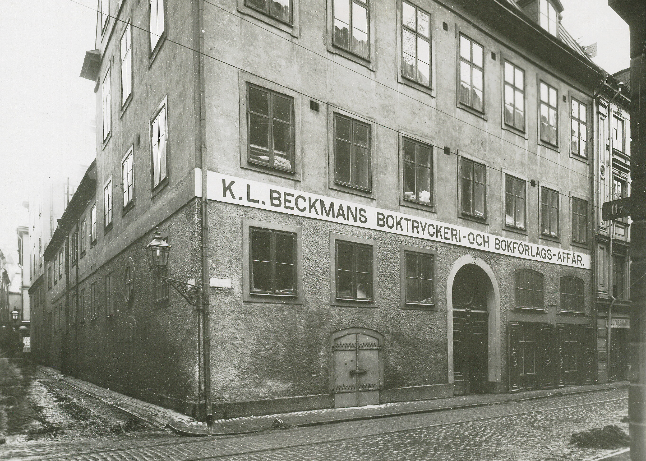 Hörnet Yxsmedgränd - Lilla Nygatan t.h. Affärsskylt: K. L. Beckmans boktryckeri- och bokförlags-affär